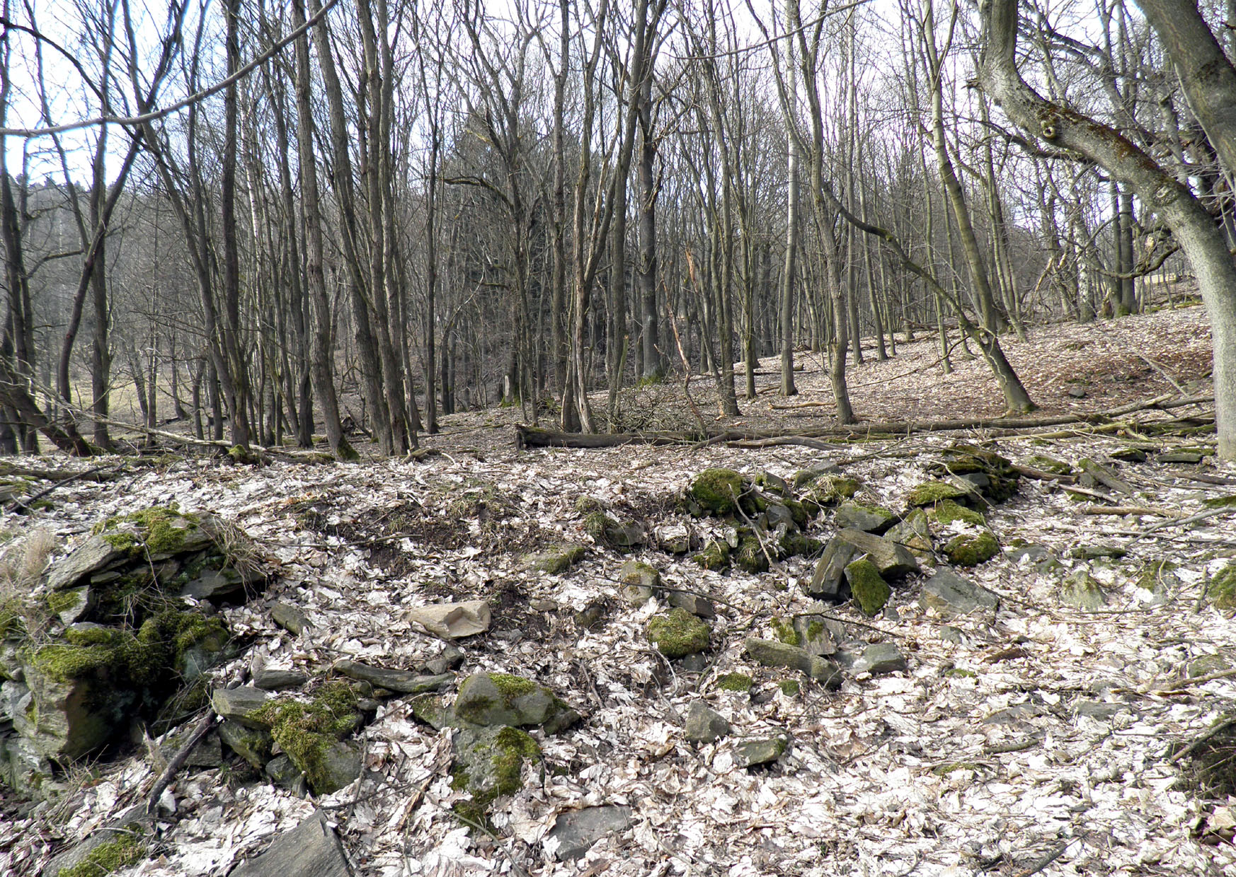 Zbytky domů v zaniklé obci Hanušov.